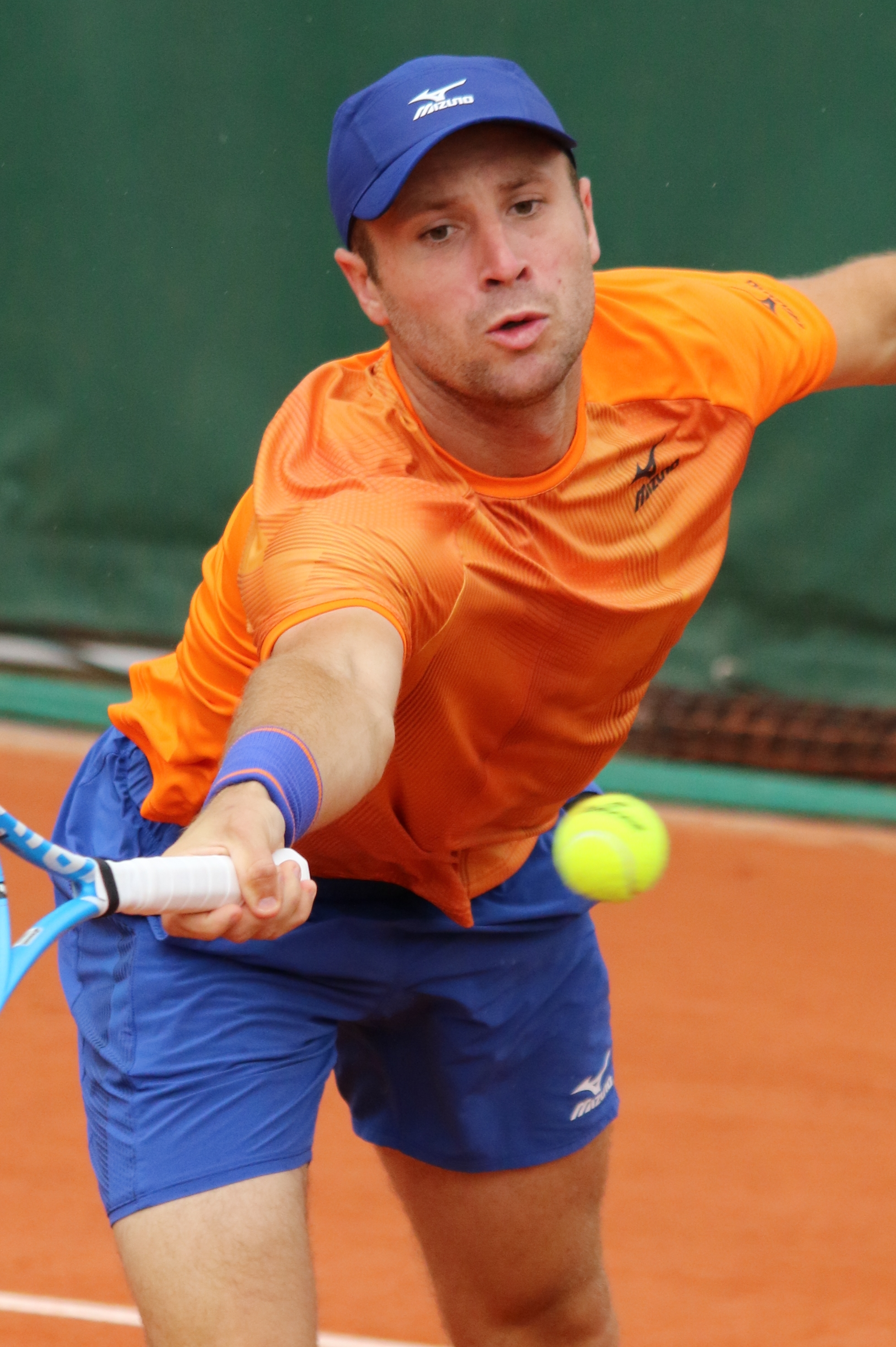 Bambridge RG19 (11)